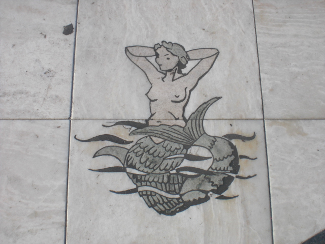 Sireno sur kahelo en la Monumento al Malkovroj